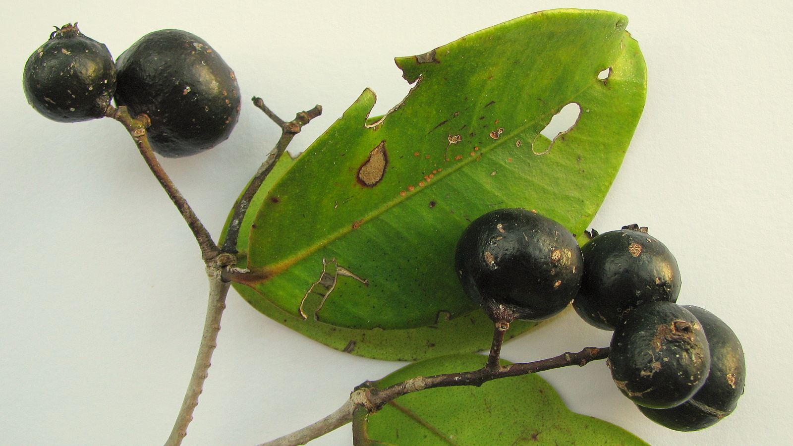 Marlierea neuwiedeana